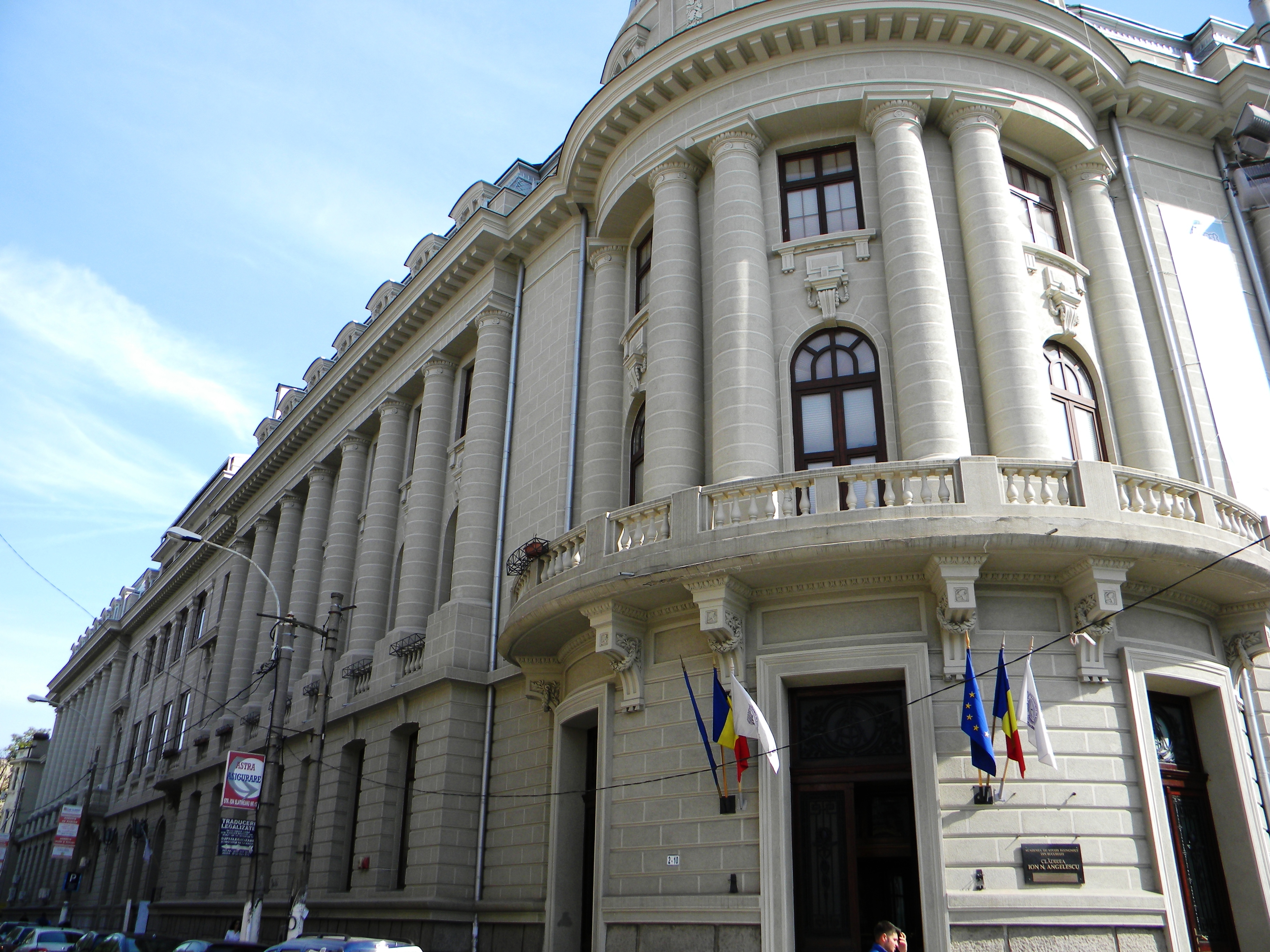 Bucuresti, Romania, Piata Romana nr. 6 (ASE) (detaliu 5); B-II-m-B-19579